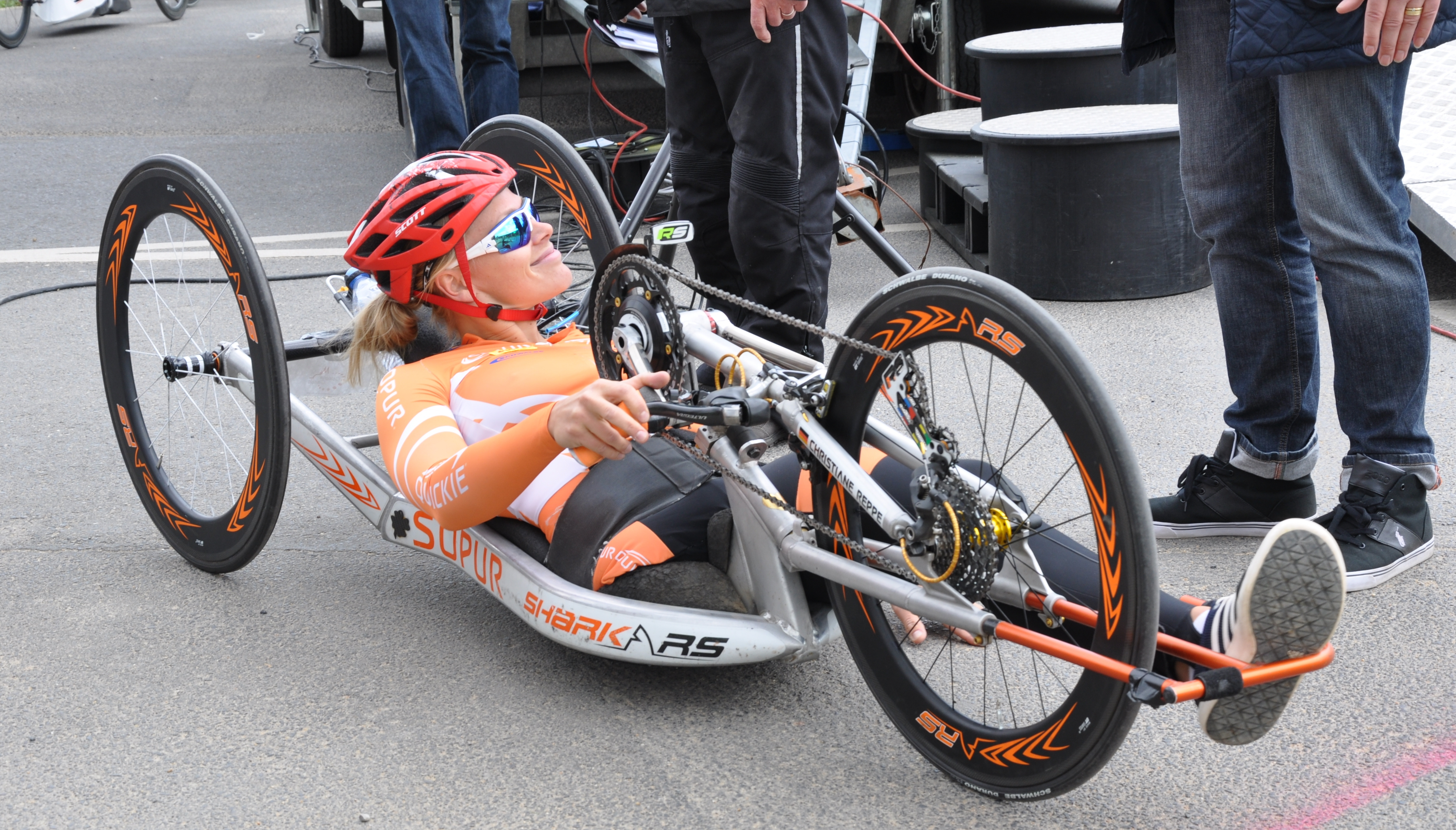 Christiane Reppe, GC Nendorf